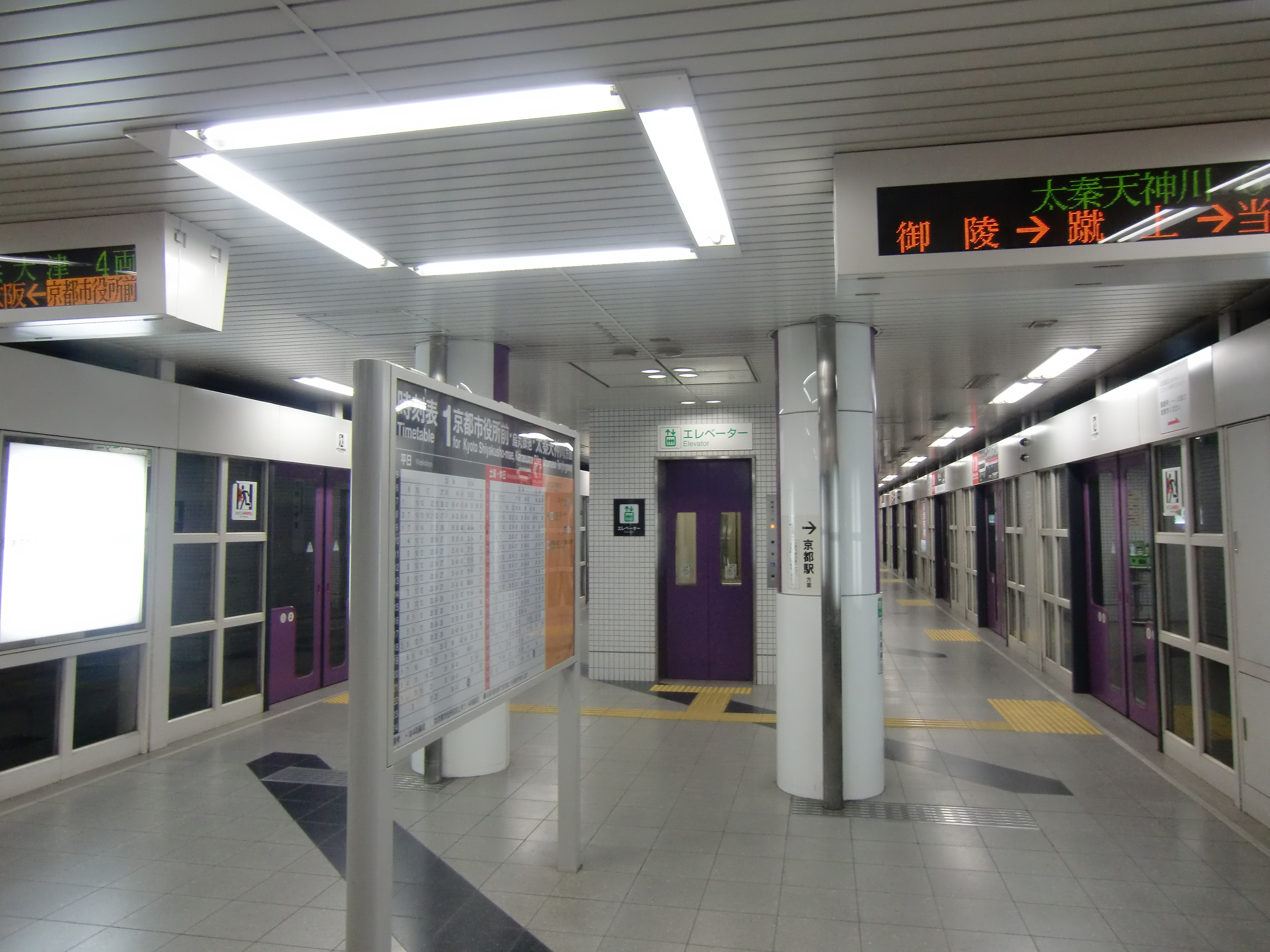 撮影日２０１２年３月２８日